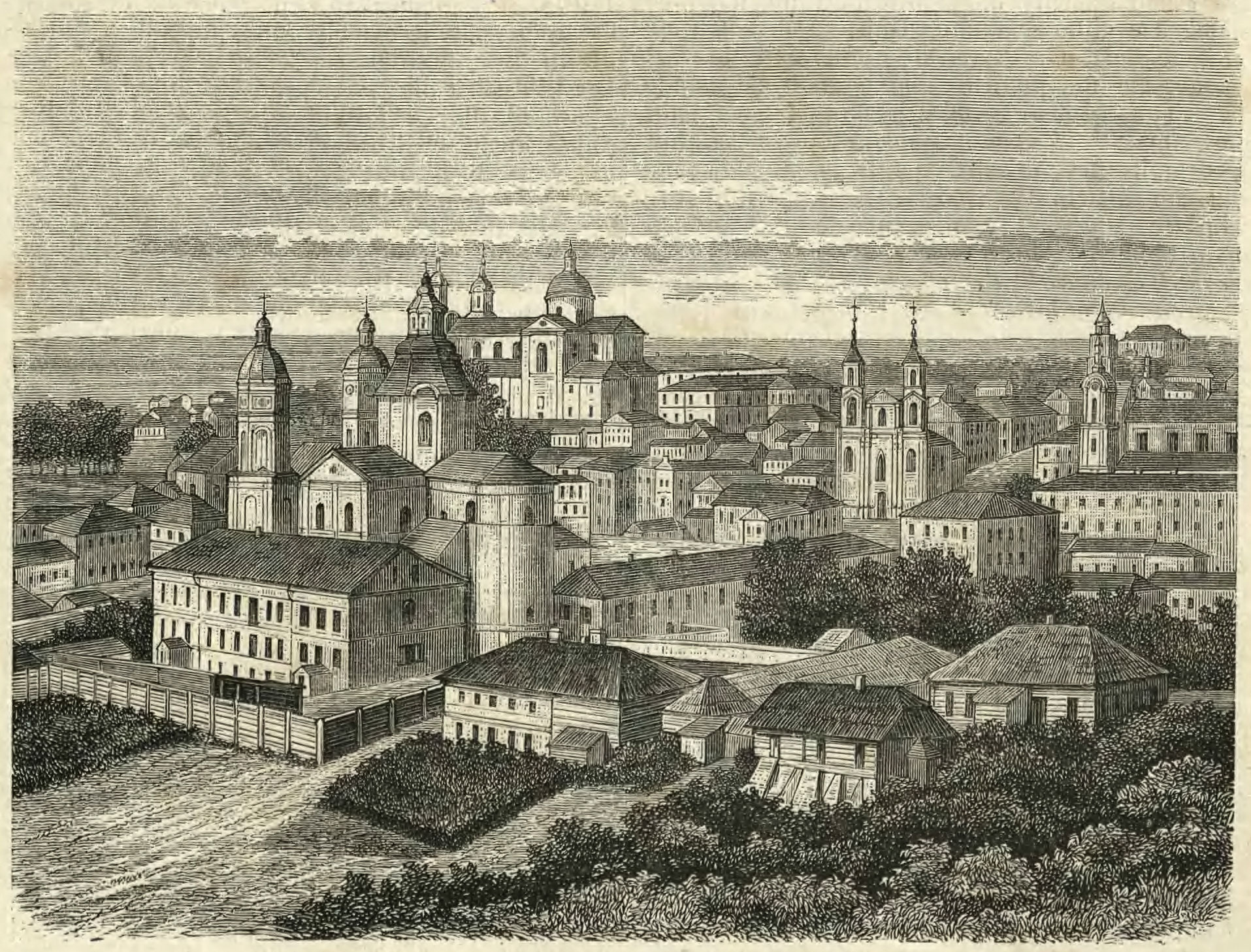 Беларуская (тарашкевіца): Віцебск (Viciebsk), вуліцы Задунаўская (vulica Zadunaŭskaja) і Вялікая (vulica Vialikaja). Панарама места